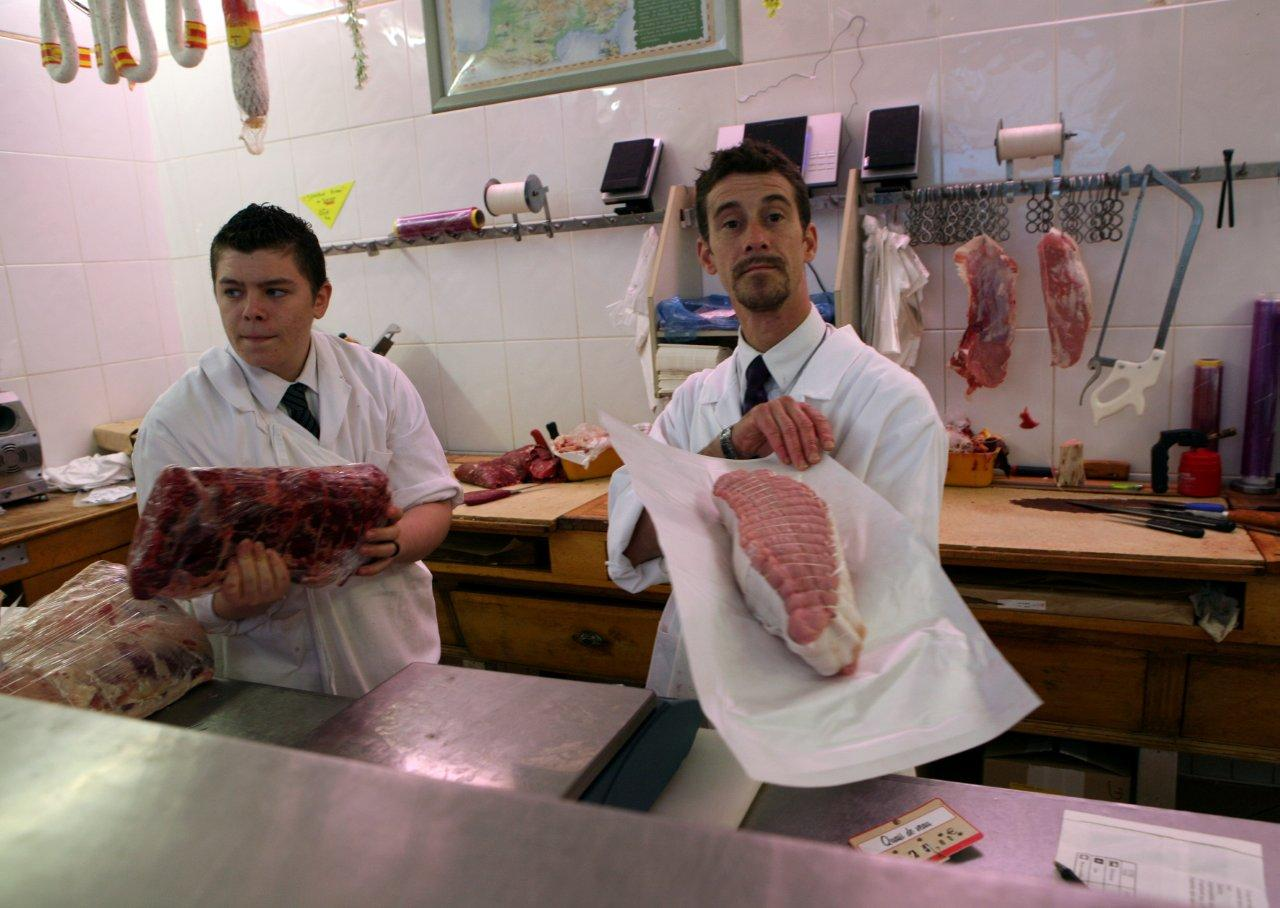 Alena Vykulilová Řezníci z Paříže 2010